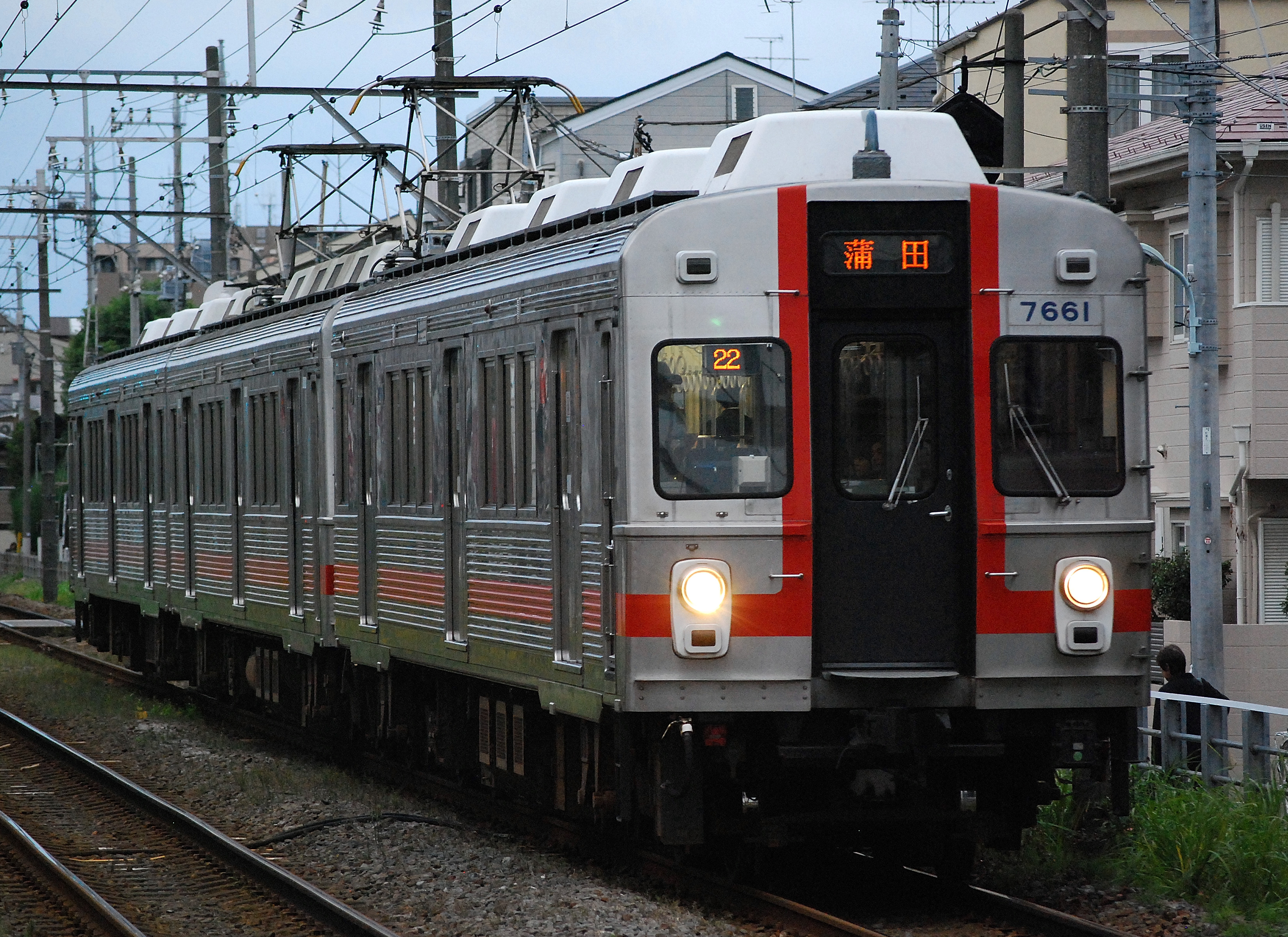 東急7600系第1編成（鵜の木駅で撮影）